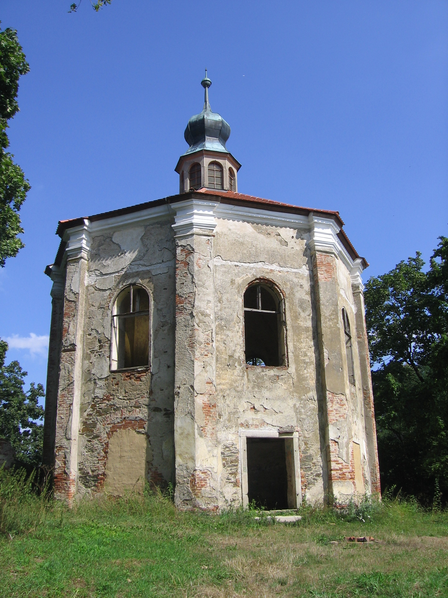 Zámek Horšovský Týn - Loretánská kaple v zámecké zahradě